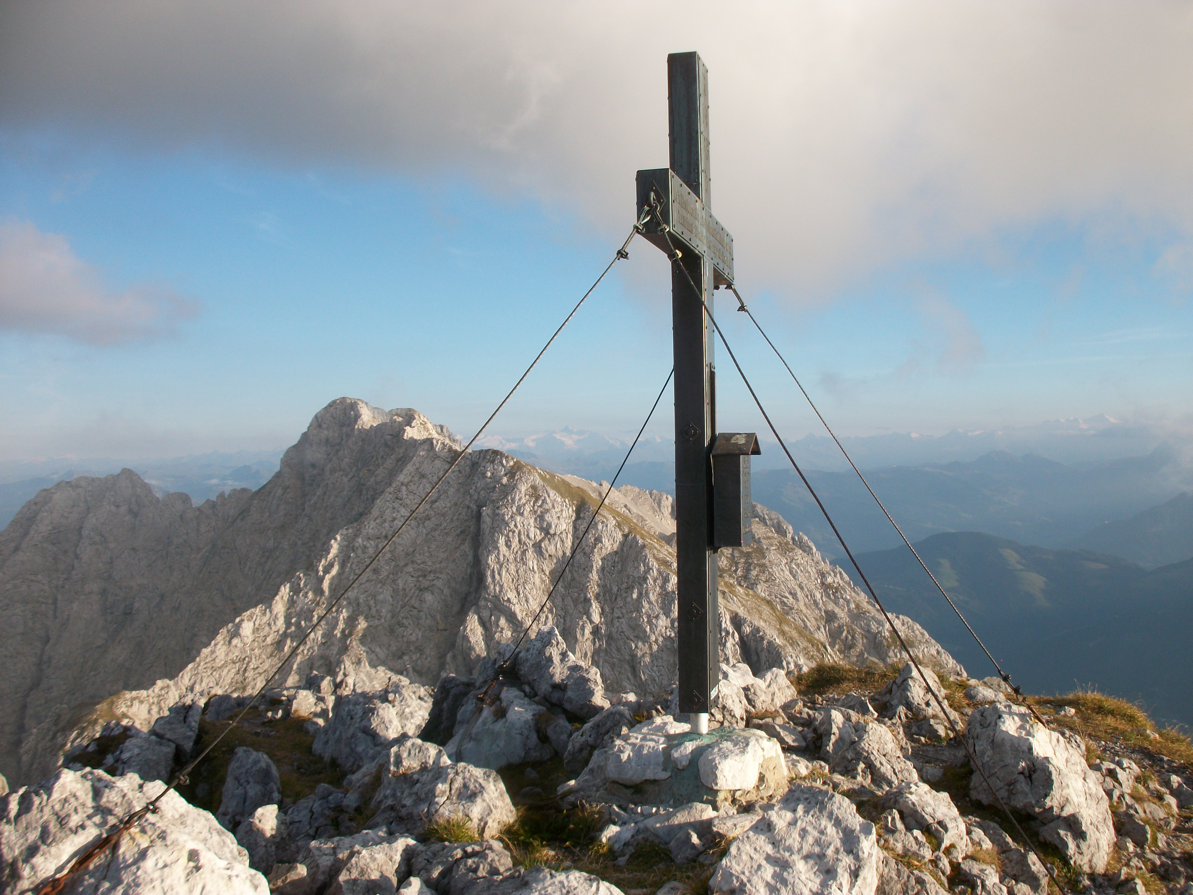 Gipfelkreuz Sonneck, im Hintergrund Treffauer